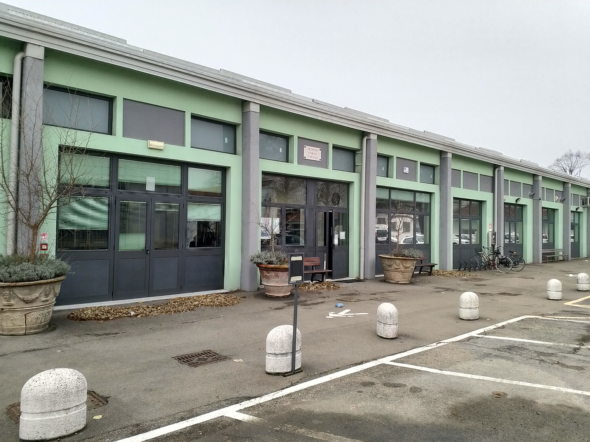 Archivio di Stato di Parma (Sede Sussidiaria di Via La Spezia 46) e Archivio Storico Comunale